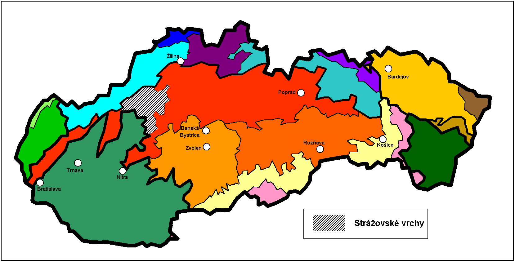 Strázovské_vrchy